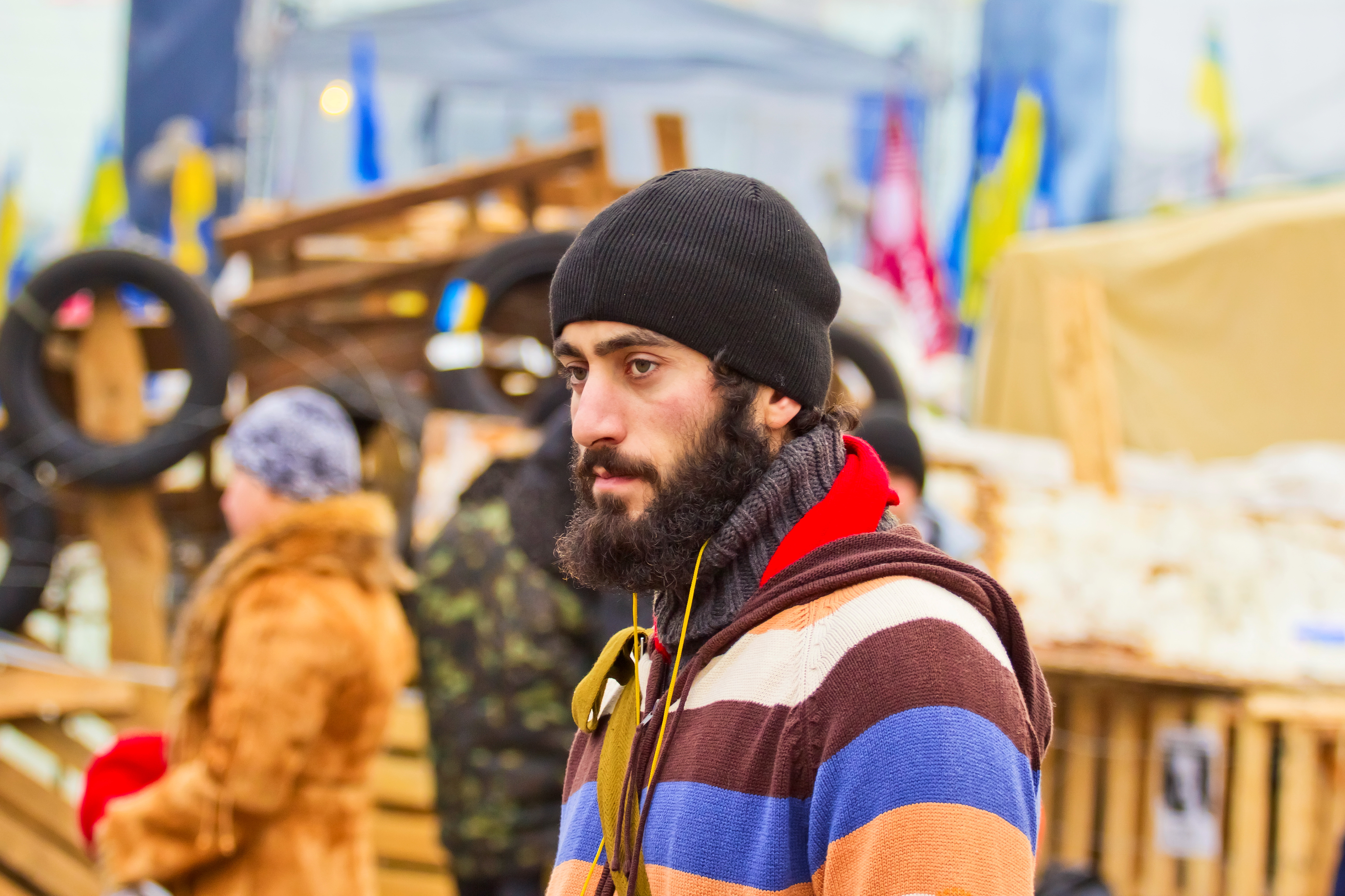 Сергей Нигоян. Первый погибший на Грушевского в Киеве.